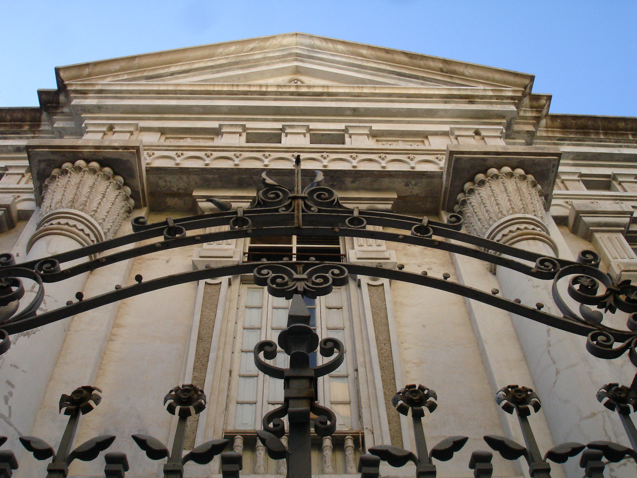 Frontis